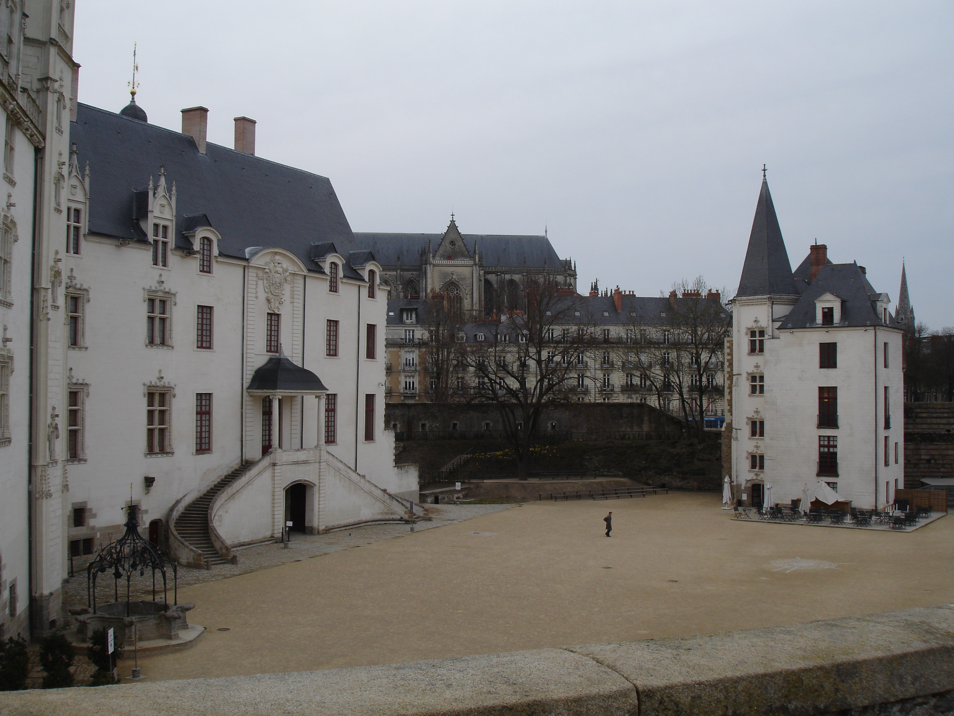 Château des ducs de Bretagne, Nantes, França